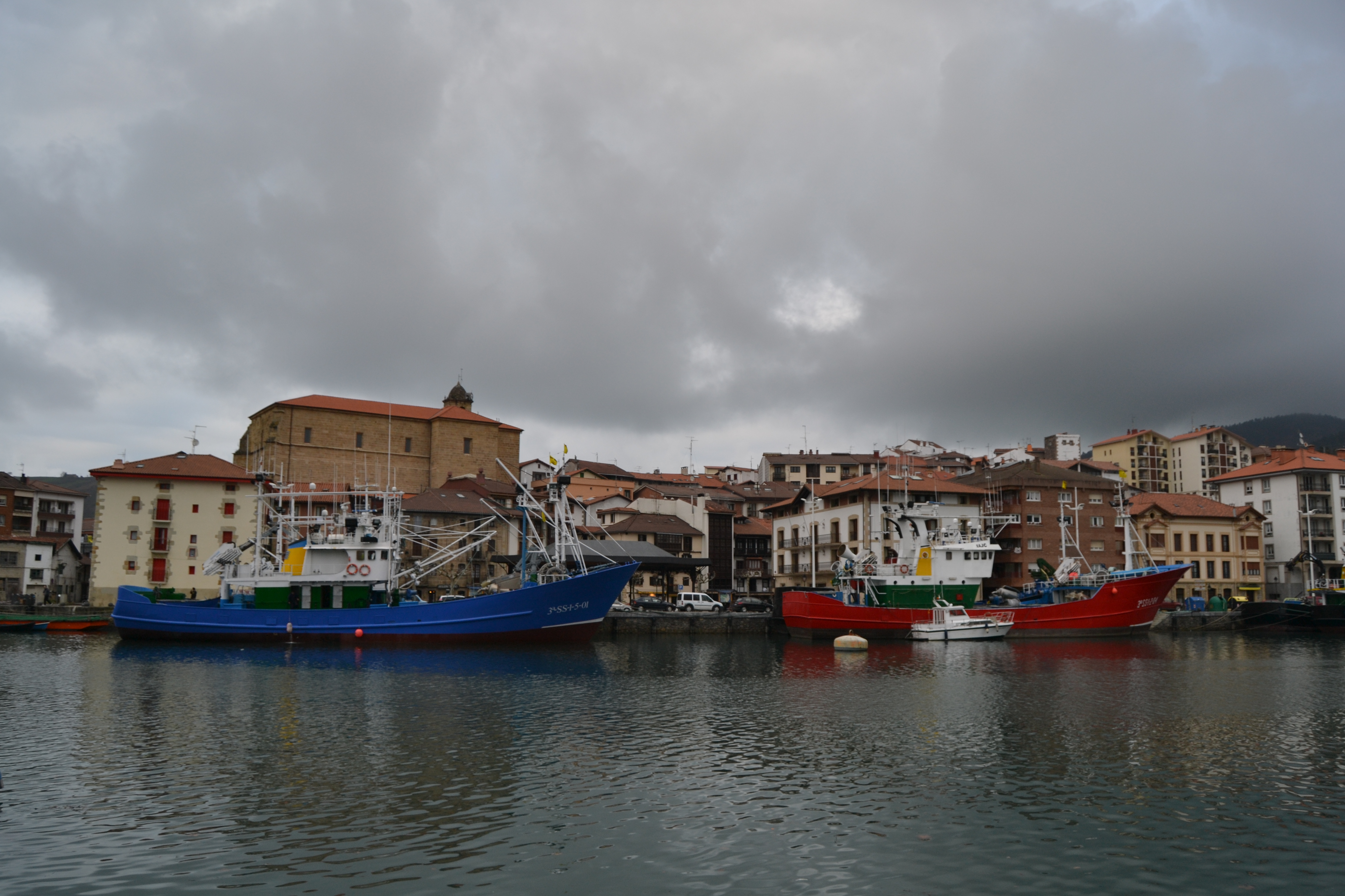 Orio. Gipuzkoa. Euskal Herria. Orio. Gipuzkoa. Basque Country.